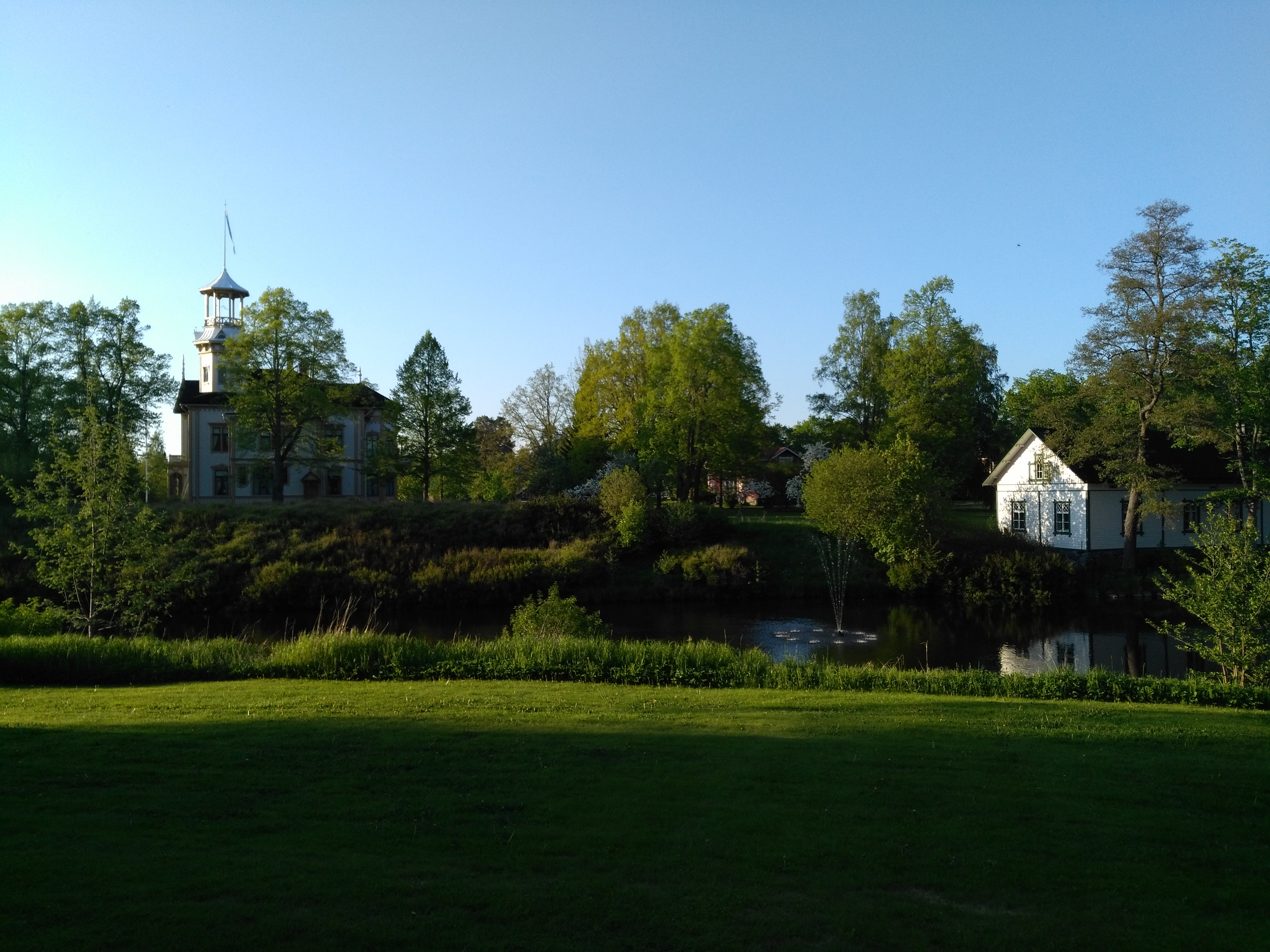 Isotalo (vasemmalla)